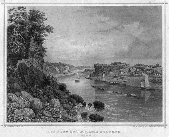 Vaade Väina jõele ja Selpilsile 1866 a.